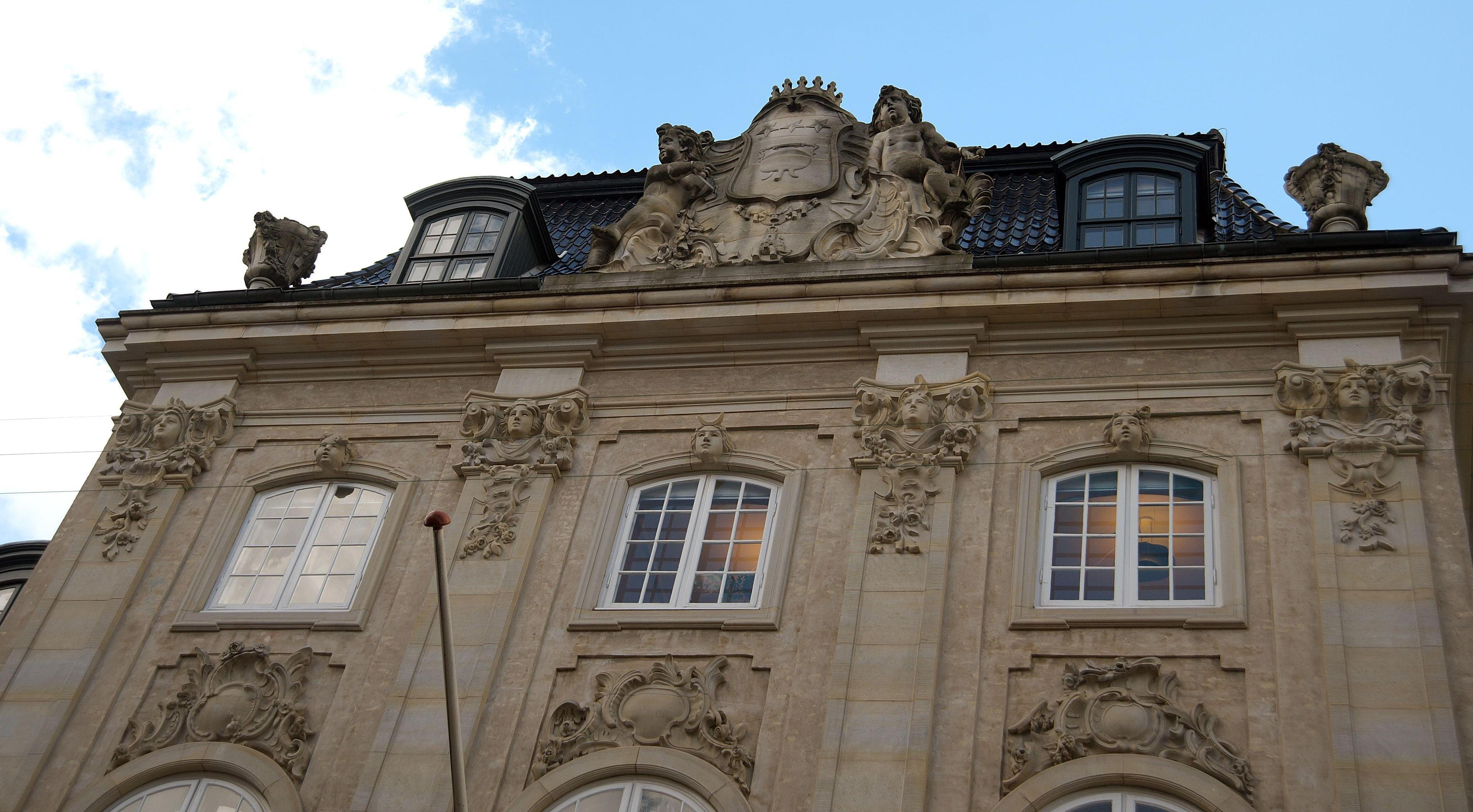 Dehns Palæ i Bredgade 54.